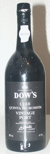 eigen foto (Bernard_Bill5) Foto van een Single Quinta Vintage Port van 1986